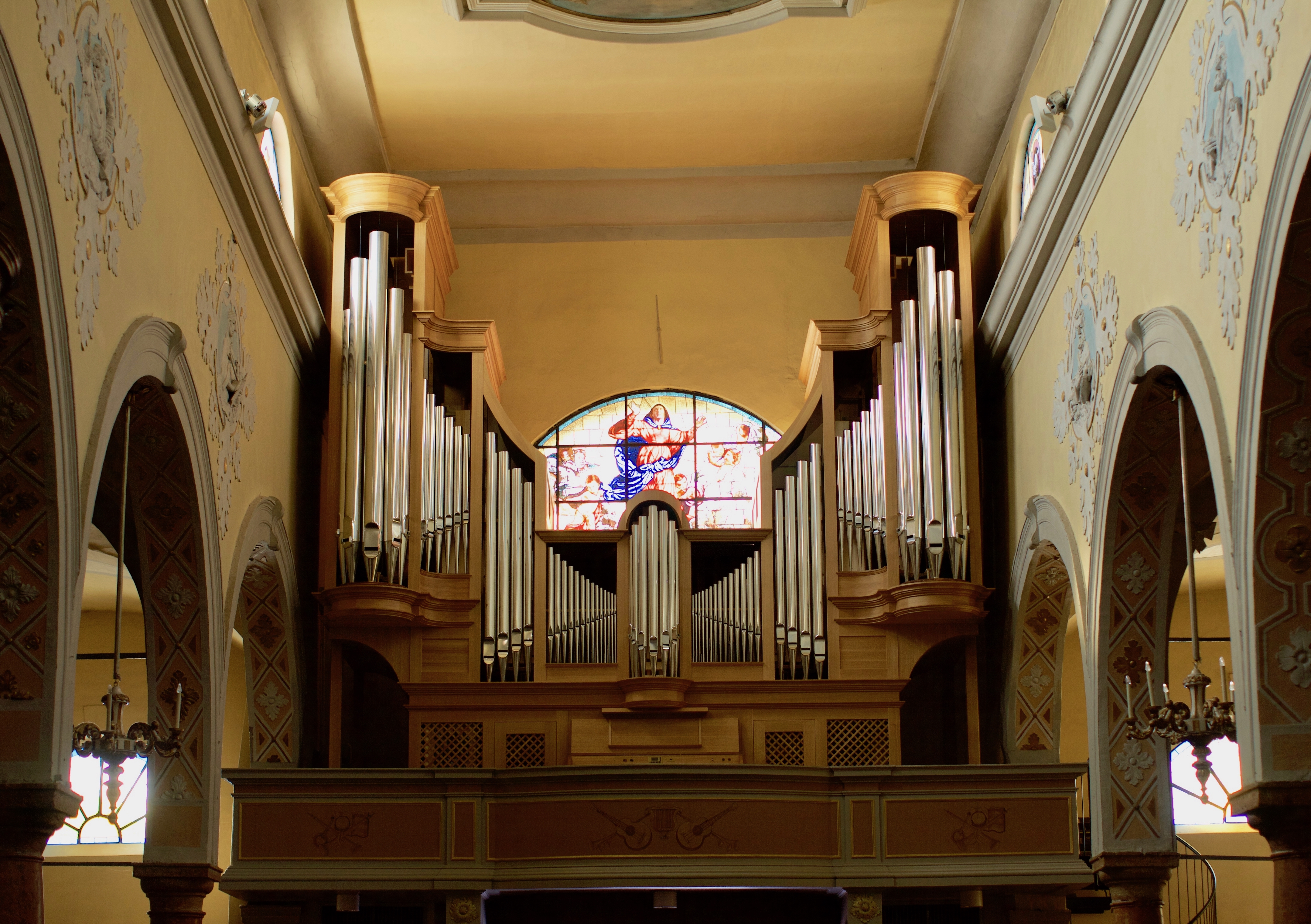 Organo Zeni, S. Maria Assunta, Marostica III - P - 33, op. 45, 2013